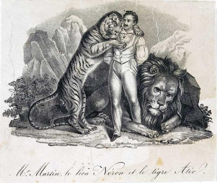 Mr. Martin, le lion Néron et le tigre Atir 1800–1850